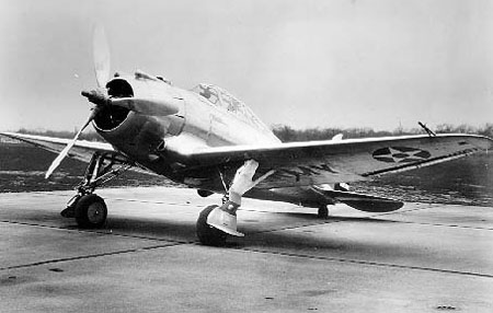 Seversky XP-41 3/4 front view